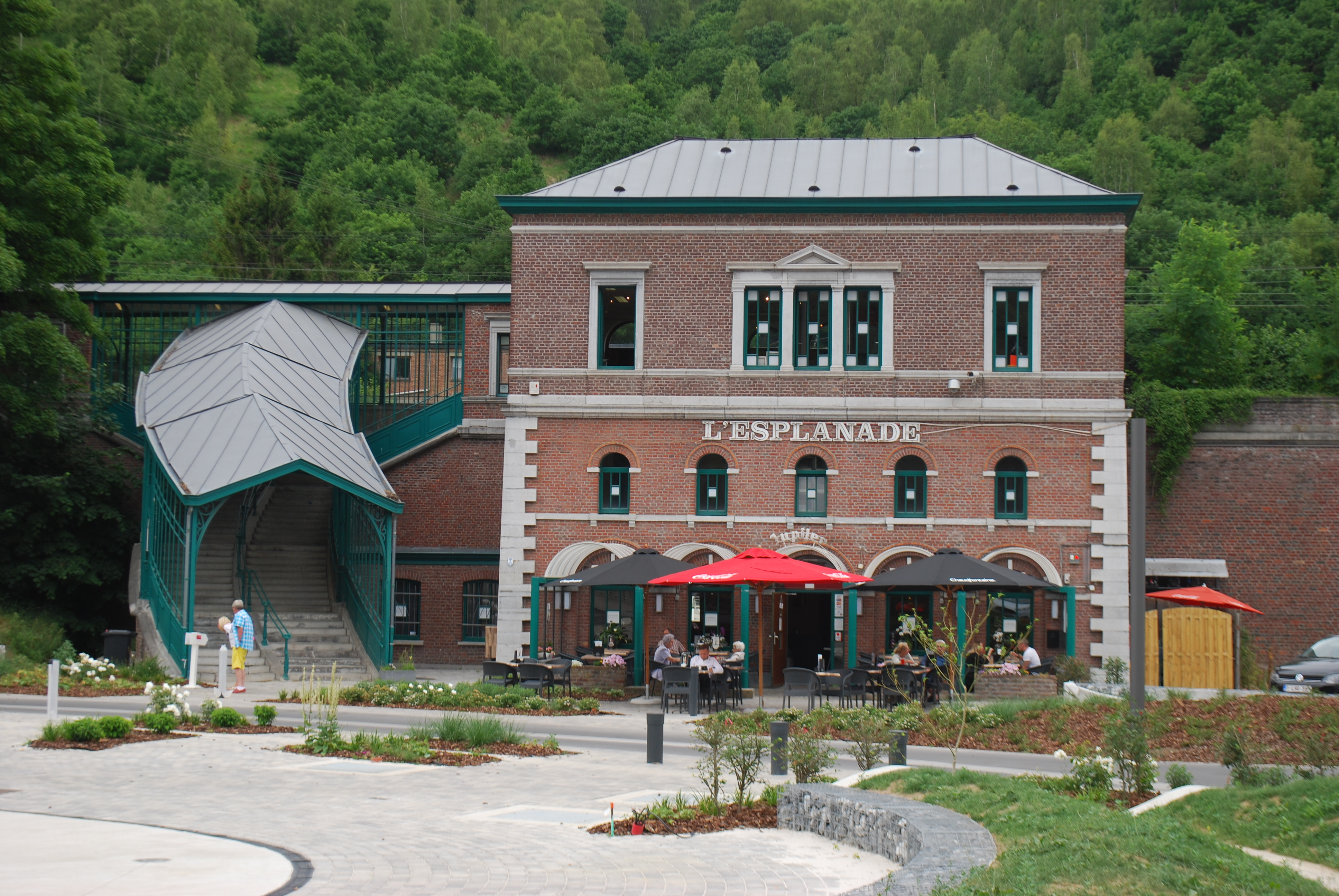 Vue de l'Esplanade du Casino à Chaudfontaine.